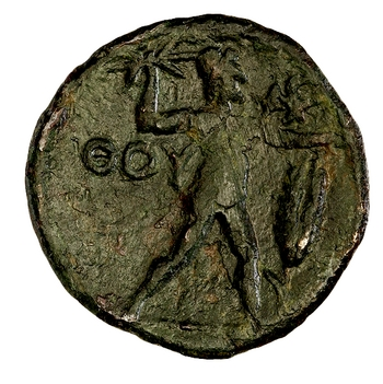 Ημιοβολός ή εξάχαλκον του Νομισματοκοπείου Θουρίας Κεφαλή της Δήμητρας φέροντας στεφάνι από σιτηρά Ο Δίας ο Ιθωμάτας σε διασκελισμό, κρατώντας κεραυνό με το δεξί του χέρι και με αετό ιστάμενο (γαντζωμένο) στον αριστερό καρπό του. Στα δεξιά υπάρχει κλαδί σιτηρών και στα αριστερά ΘΟΥ . Διάμετρος Μάζα 7,63 gr.